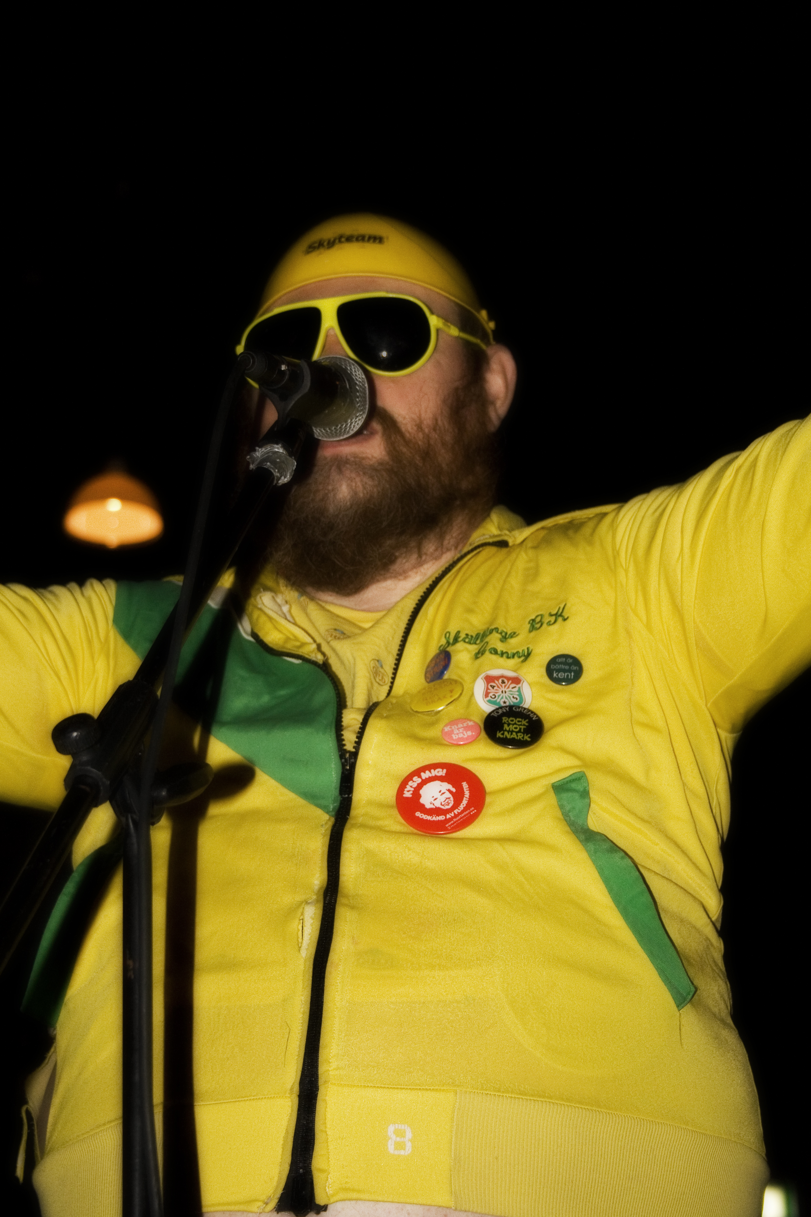 Gula gubben sjonger å bär sig åt i Norska urmarkerna.